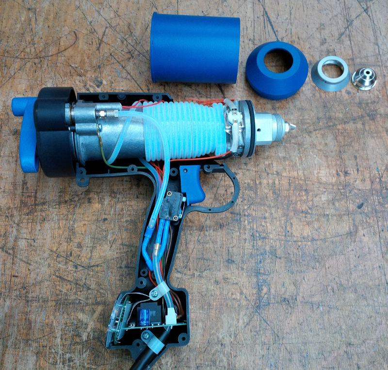 Pneumatische Heißklebepistole Bühnen HB 710 Spray.